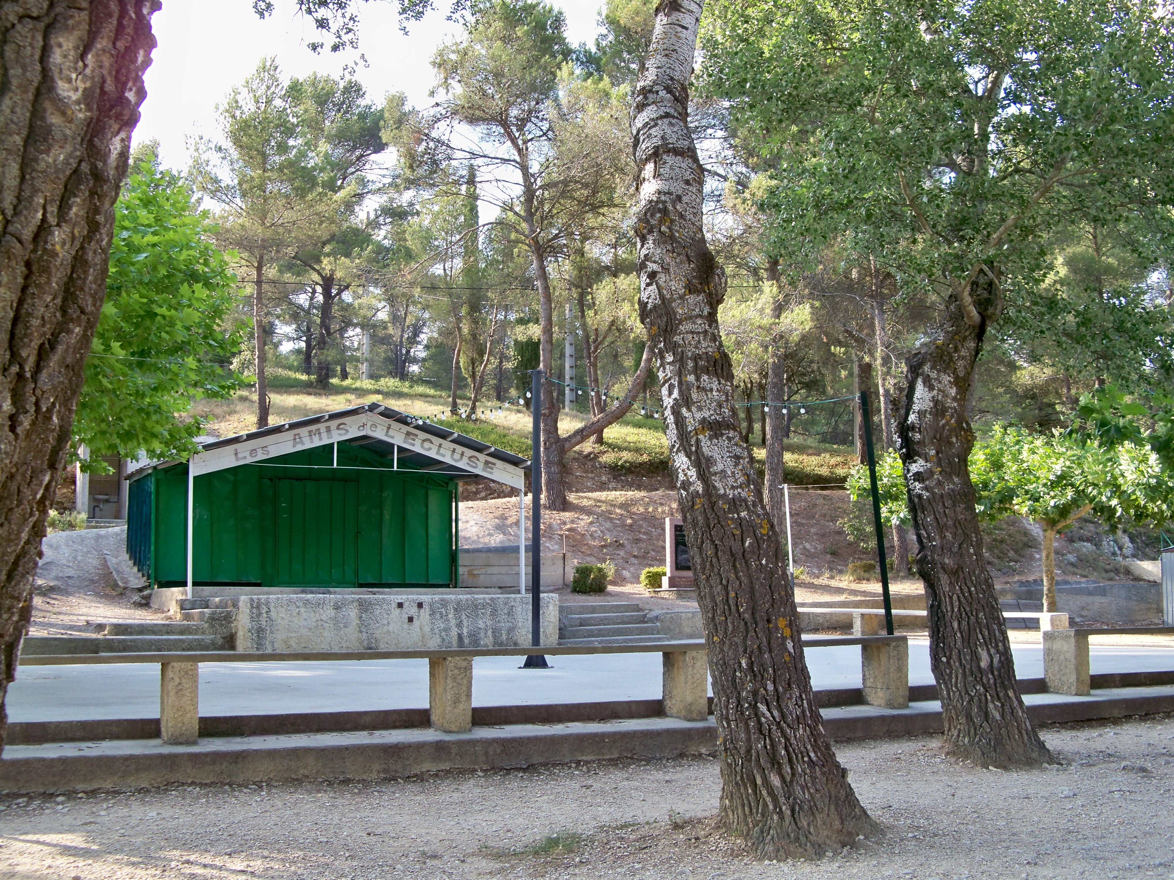 Guinguette du Lac du Paty, Caromb, Vaucluse, France